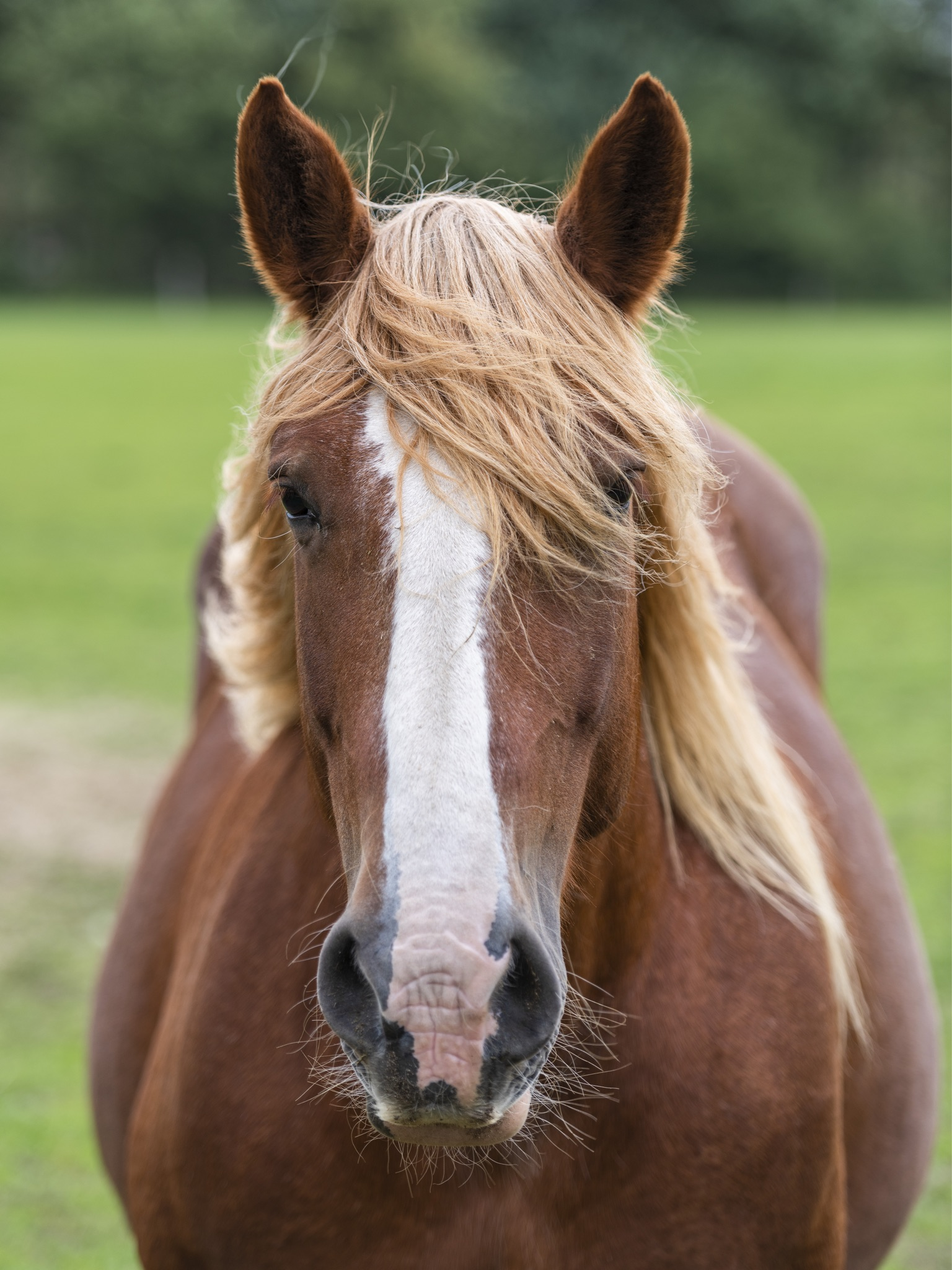 Schleswig Coldblood (27.09.2018)